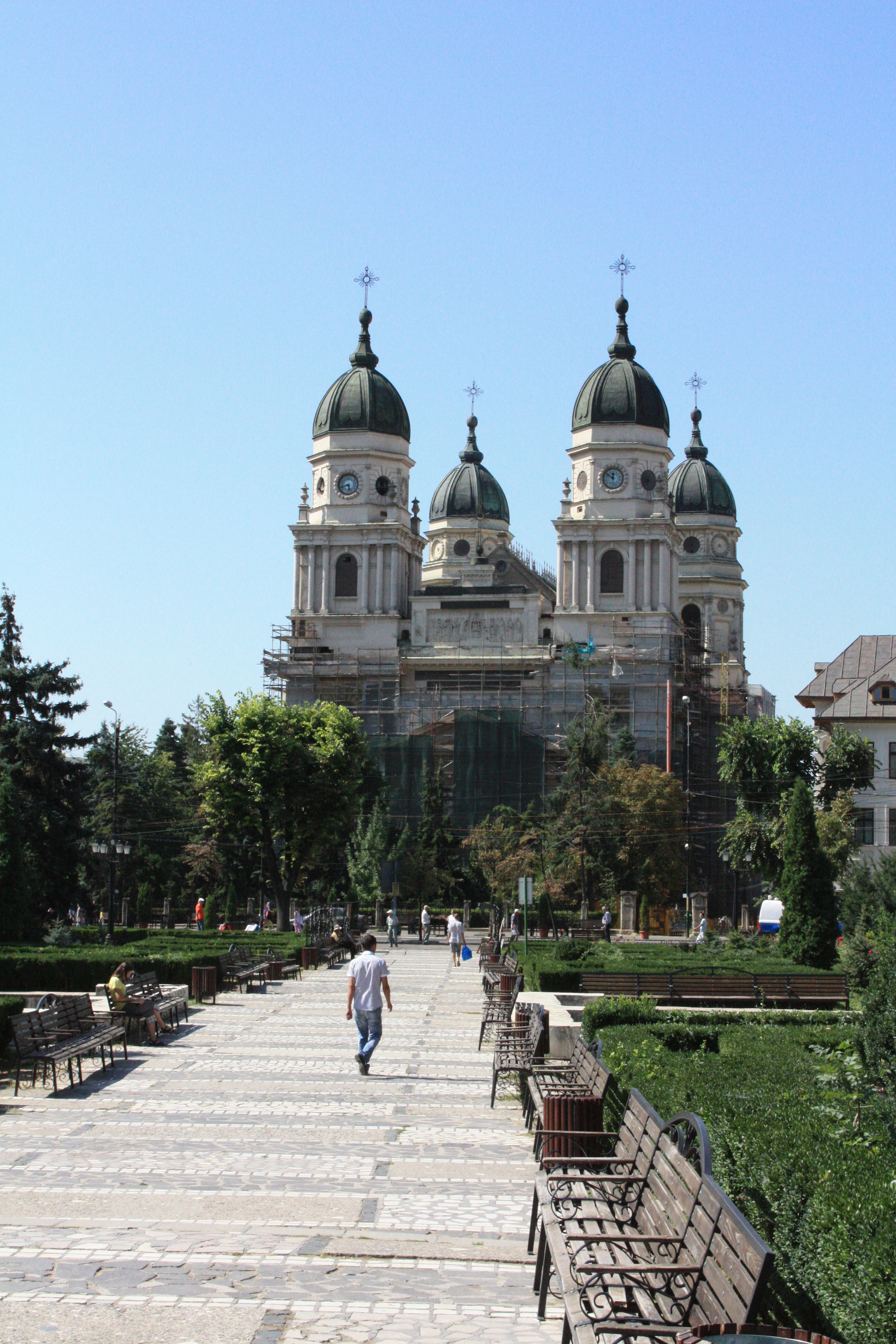 Cathédrale orthodoxe Saint Georges de IasiRomână: Catedrala Sf. Gheorghe 01